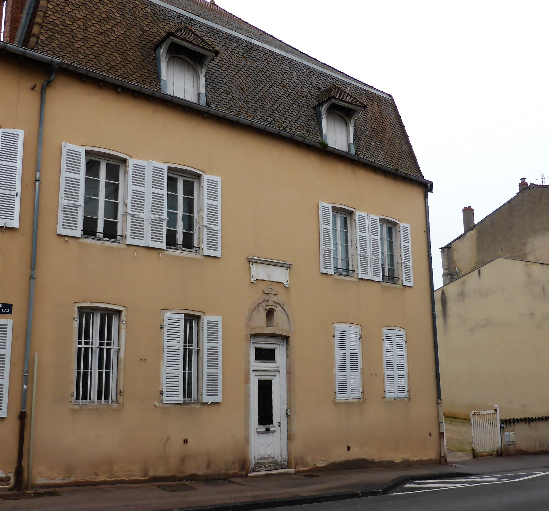 Façade en 2017 de l'ancien hôpital de la Providence fondé par Louis Agut